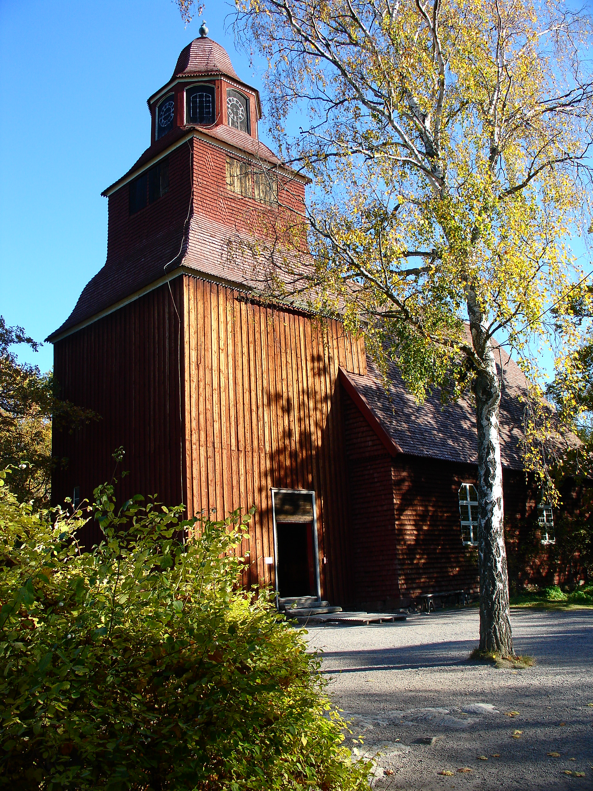 Seglora kyrka, Skansen Stockholm Foto Hasse A